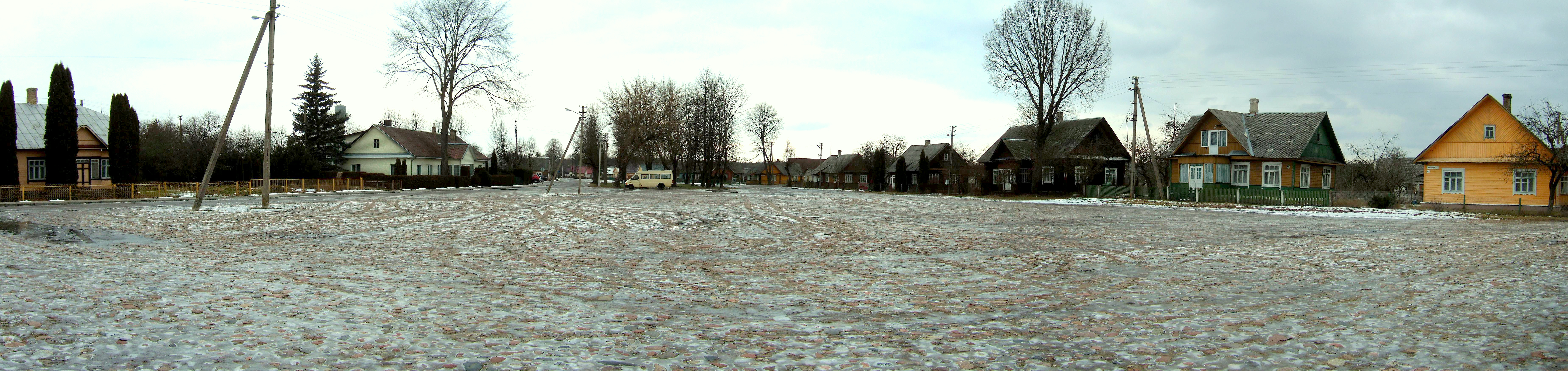 Valkininkų aikštė